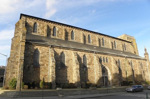 Flanc sud (édifice non orienté) de l'église Saint-Pierre de Pleurtuit (35).